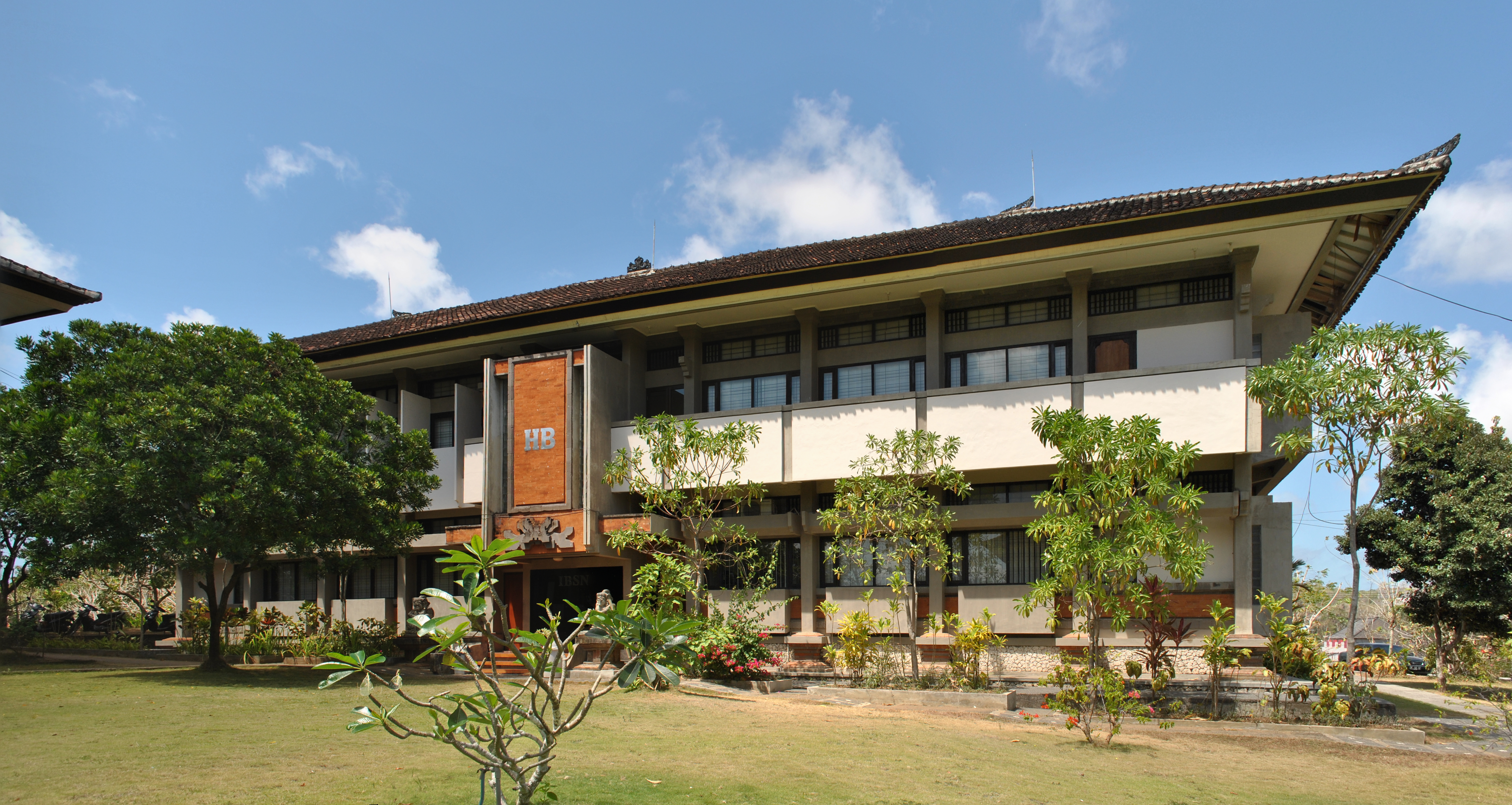 Salah satu gedung di Universitas Udayana Kampus Bukit A building in Bukit campus of Universitas Udayana Original image on panoramio